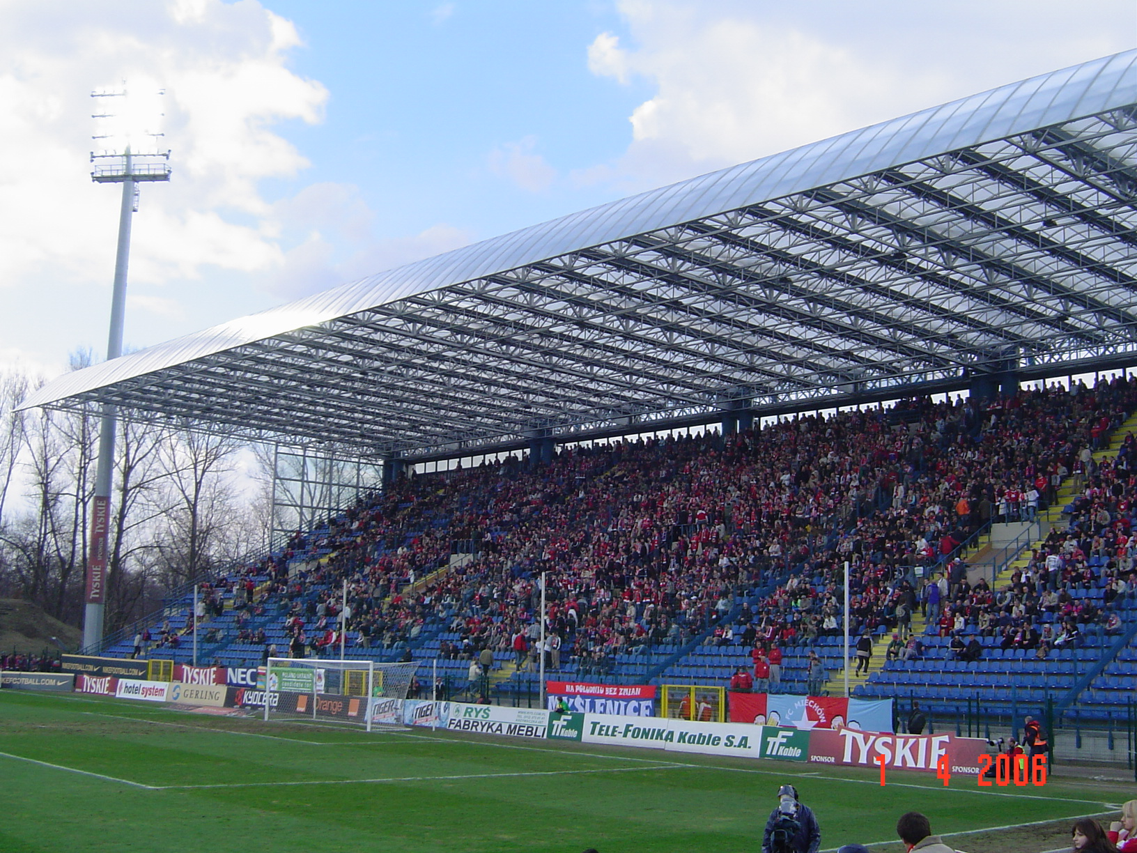 Stadion miejski w Krakowie